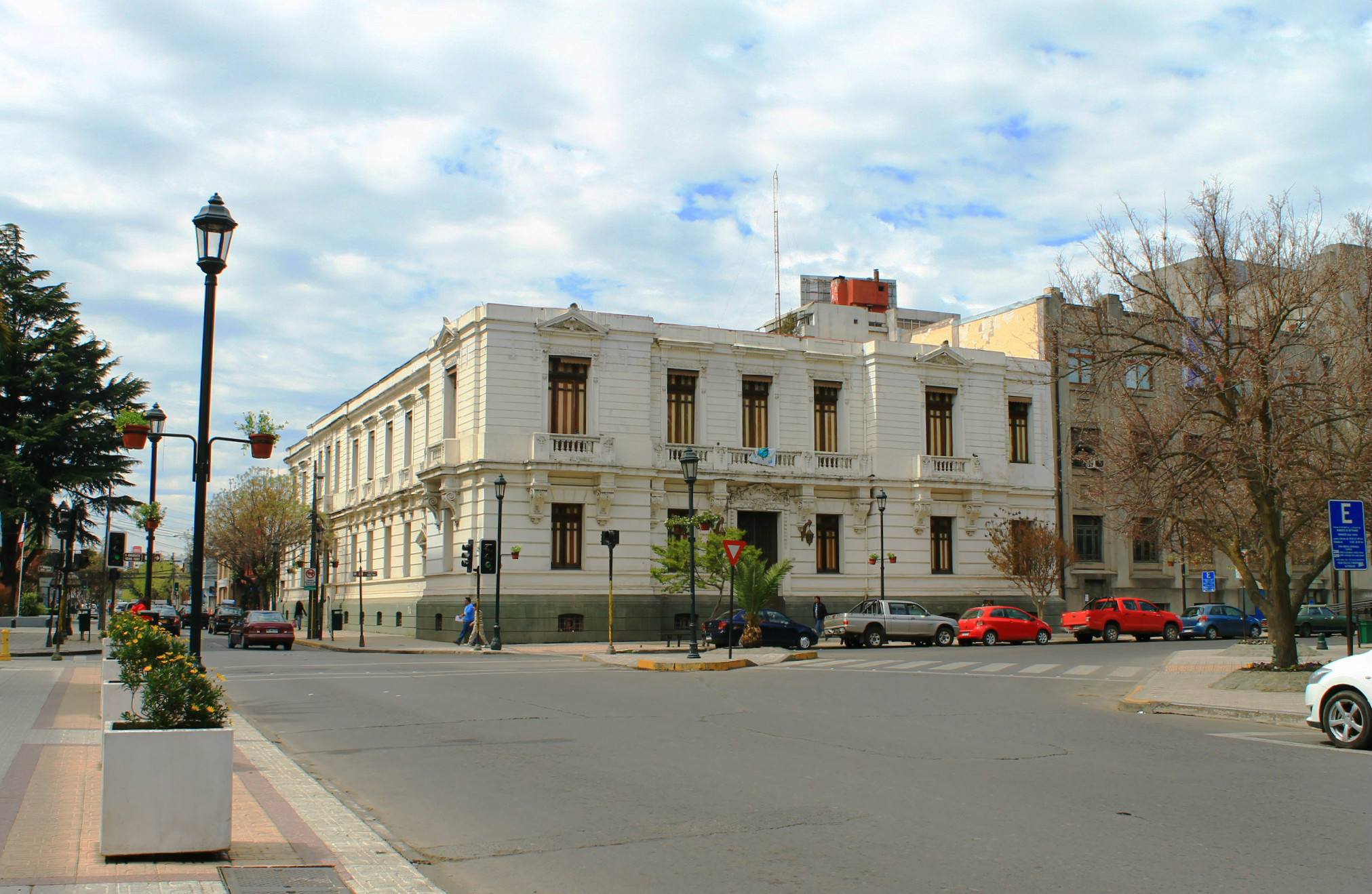 Edificio de la Intendencia de la Región del Maule This is a photo of a national monument in Chile: 448